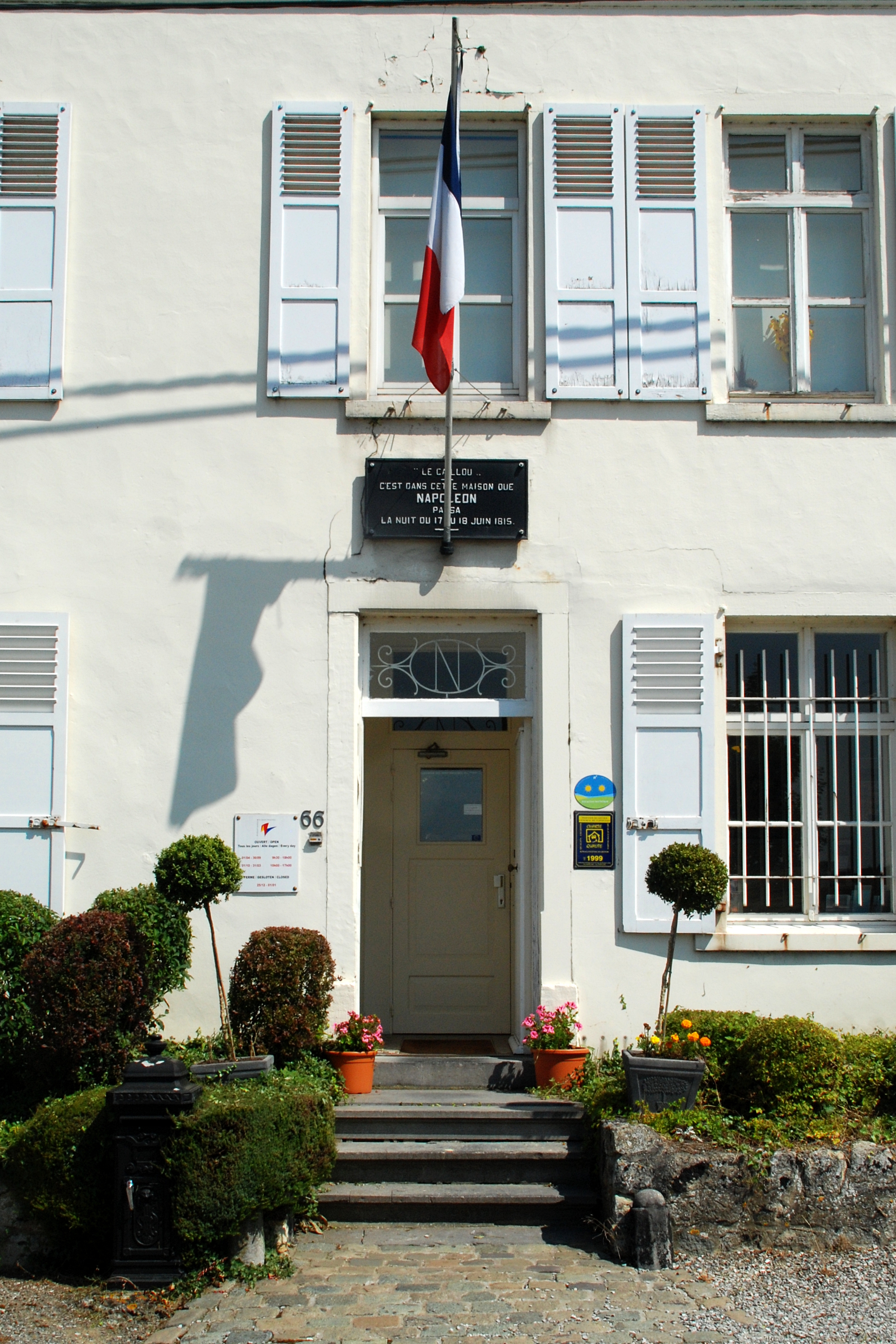 Belgique - Brabant wallon - Genappe - Ferme du Caillou